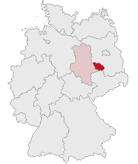 Landkreis Wittenberg, Saxony-Anhalt, Germany